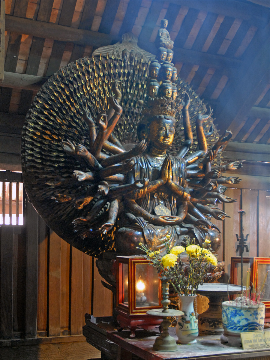 Quan Am dans le sanctuaire de la pagode But Thap. La statue aux mille bras et mille yeux de Quan Am représente le Bodhissattva Avalokiteshvara. voir la copie au musée national d'Hanoi La pagode But Thap (Ninh-Phuc) s'élève dans le village de Dinh To, à 30 Km au sud-est de Hanoi. Elle a été érigée en 1646-1647 par le moine chinois Minh Hanh. Elle compte plusieurs bâtiments dont quatre sont entourés d'un mur d'enceinte. Les bâtiments sont reliés par des galeries.